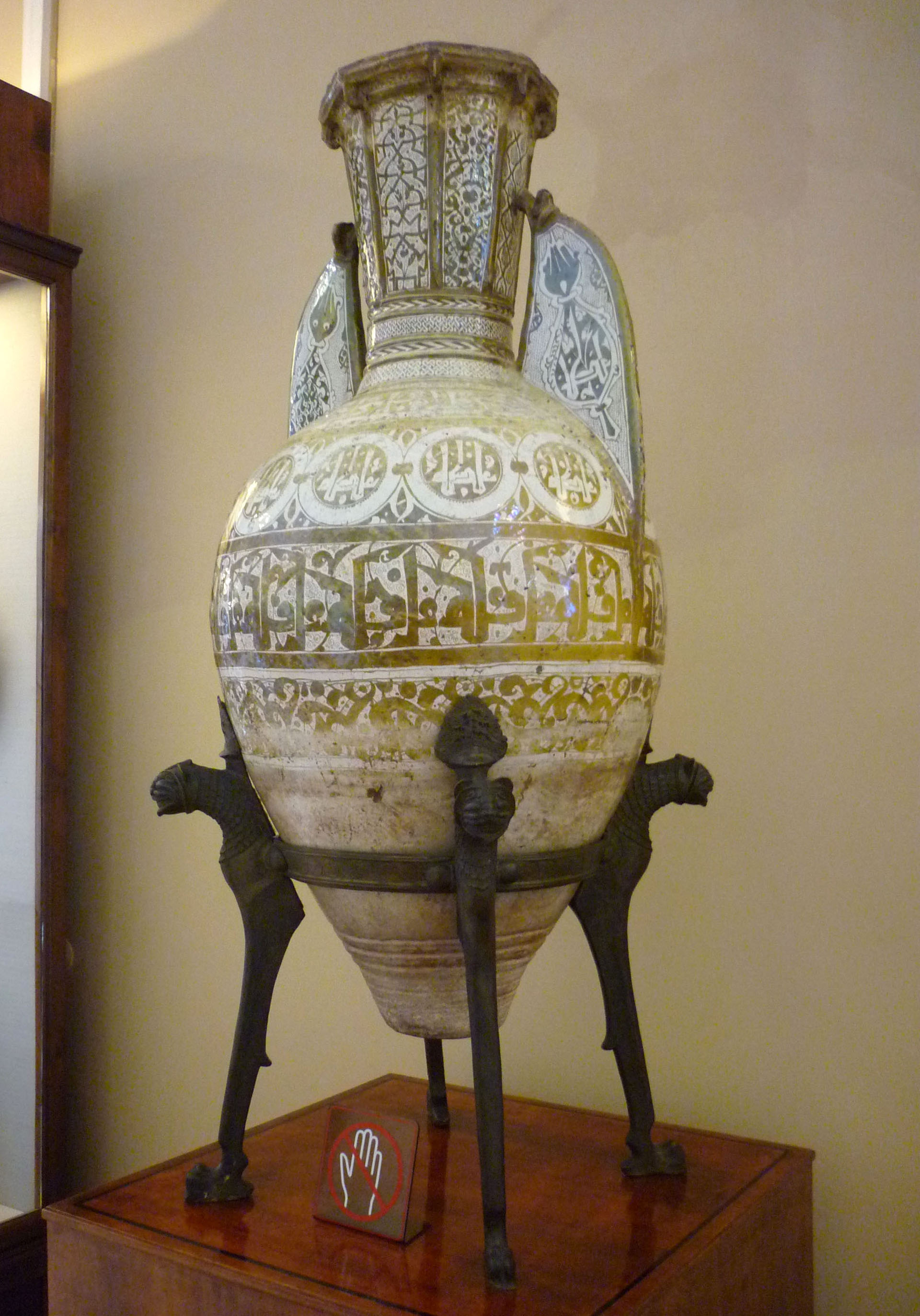 Vaso de Fortuny, de cerámica hispano.morisca con reflejos metálicos procedente de Málaga (España) datado del siglo XIV conservado en el Museo del Ermitage ( San Petersburgo)